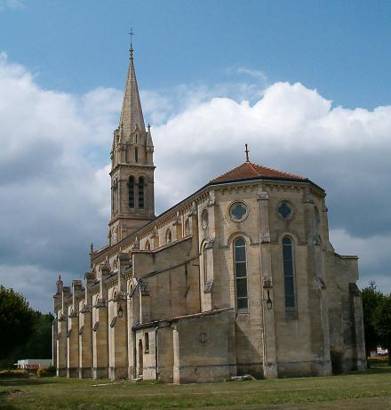 Eglise de Sainte-Hélène (Gironde)